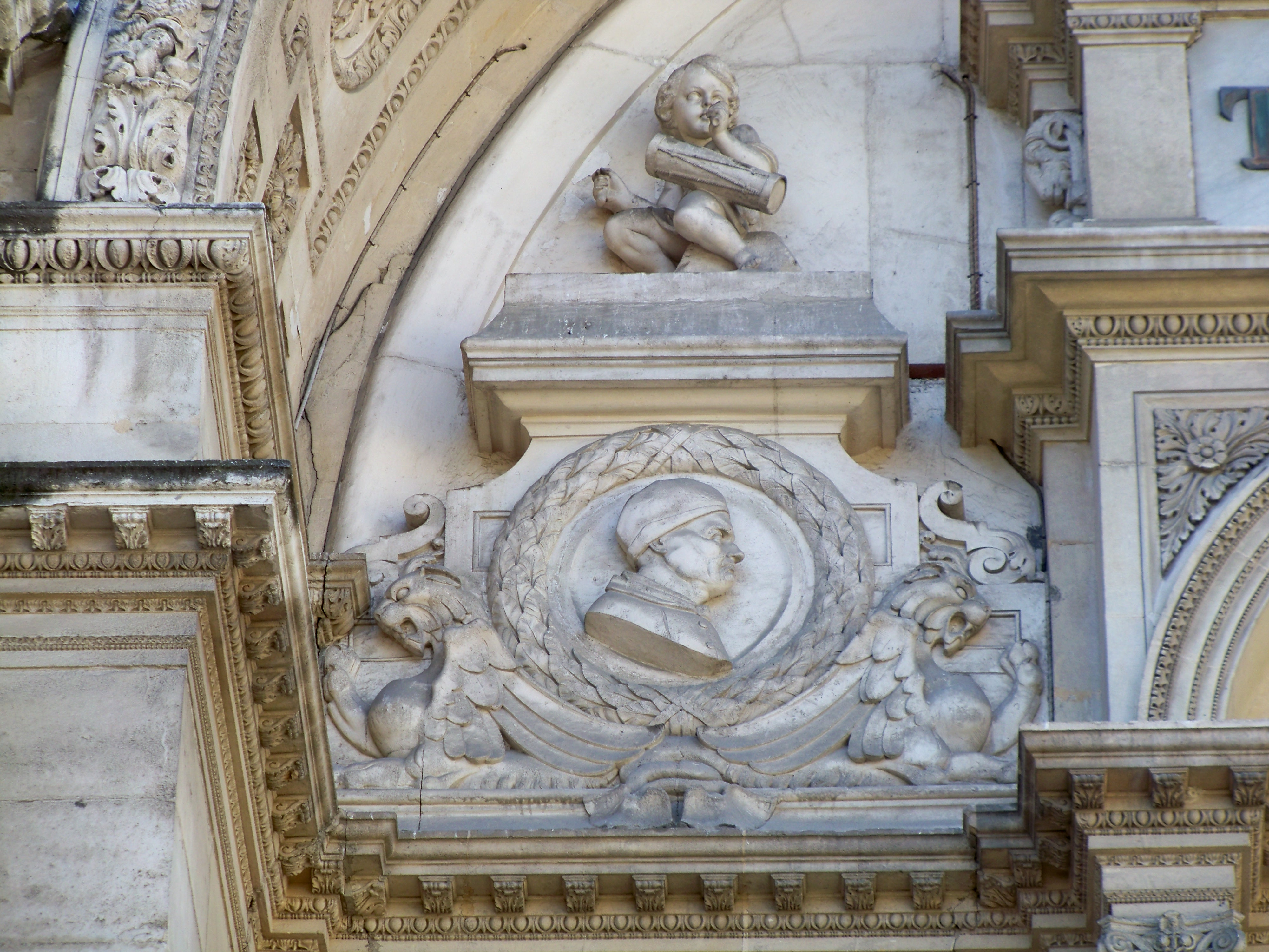 détail de la facade du théatre d'Avignon